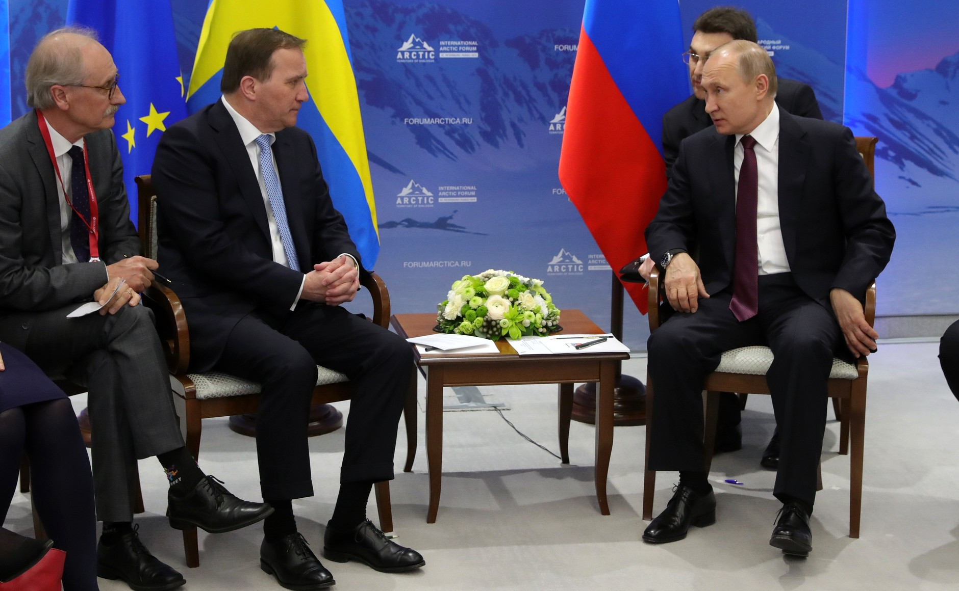 Встреча Президента Российской Федерации Владимира Путина с Премьер-министром Королевства Швеция Стефаном Лёвеном